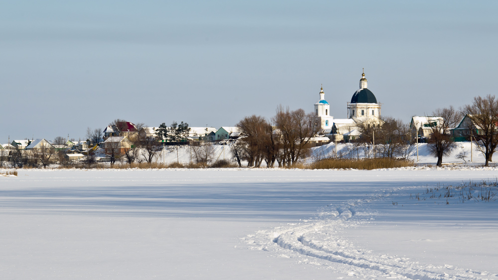 Покровская церковь, г.Урюпинск. Вид с озера Подпесочного.